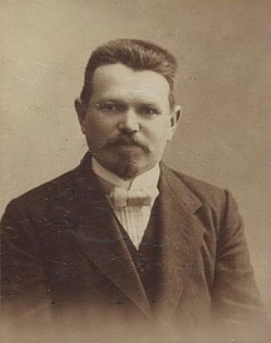 Josef Blau (1872-1960), sudetoněmecký učitel, vlastenec a historik.